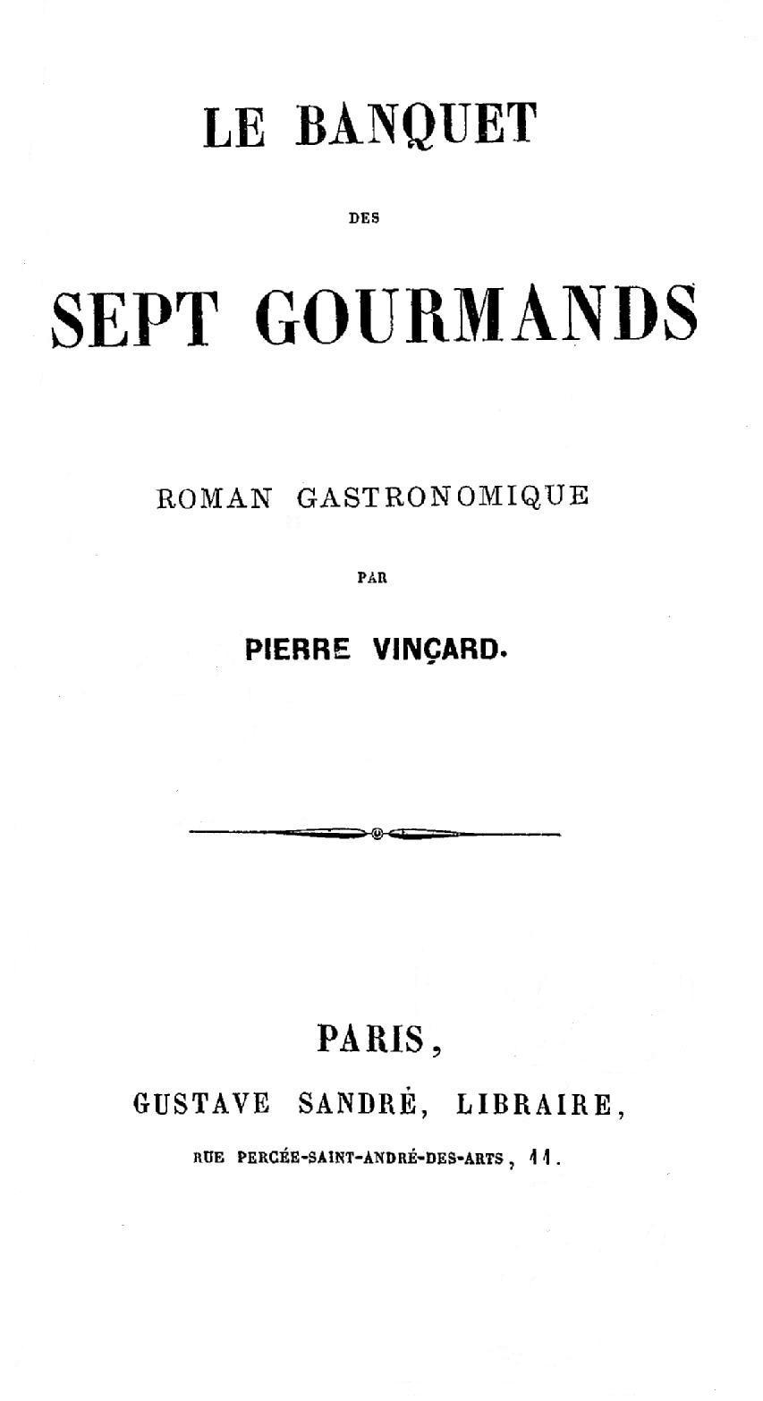 Page de titre du roman gastronomique de Pierre Vinçard Le Banquet des sept gourmands